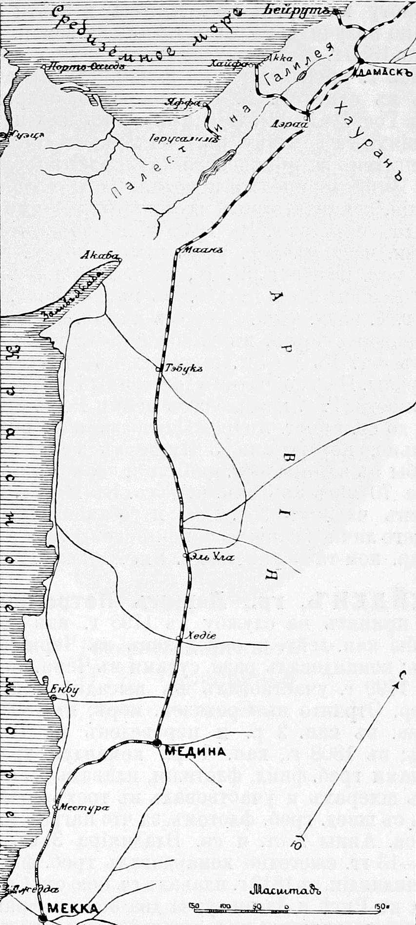 Данное фото было использовано в статье «Геджасская железная дорога» опубликованной в седьмом томе «Военной энциклопедии», который был издан книгоиздательским товариществом И. Д. Сытина в 1912 году в столице Российской империи городе Санкт-Петербурге.